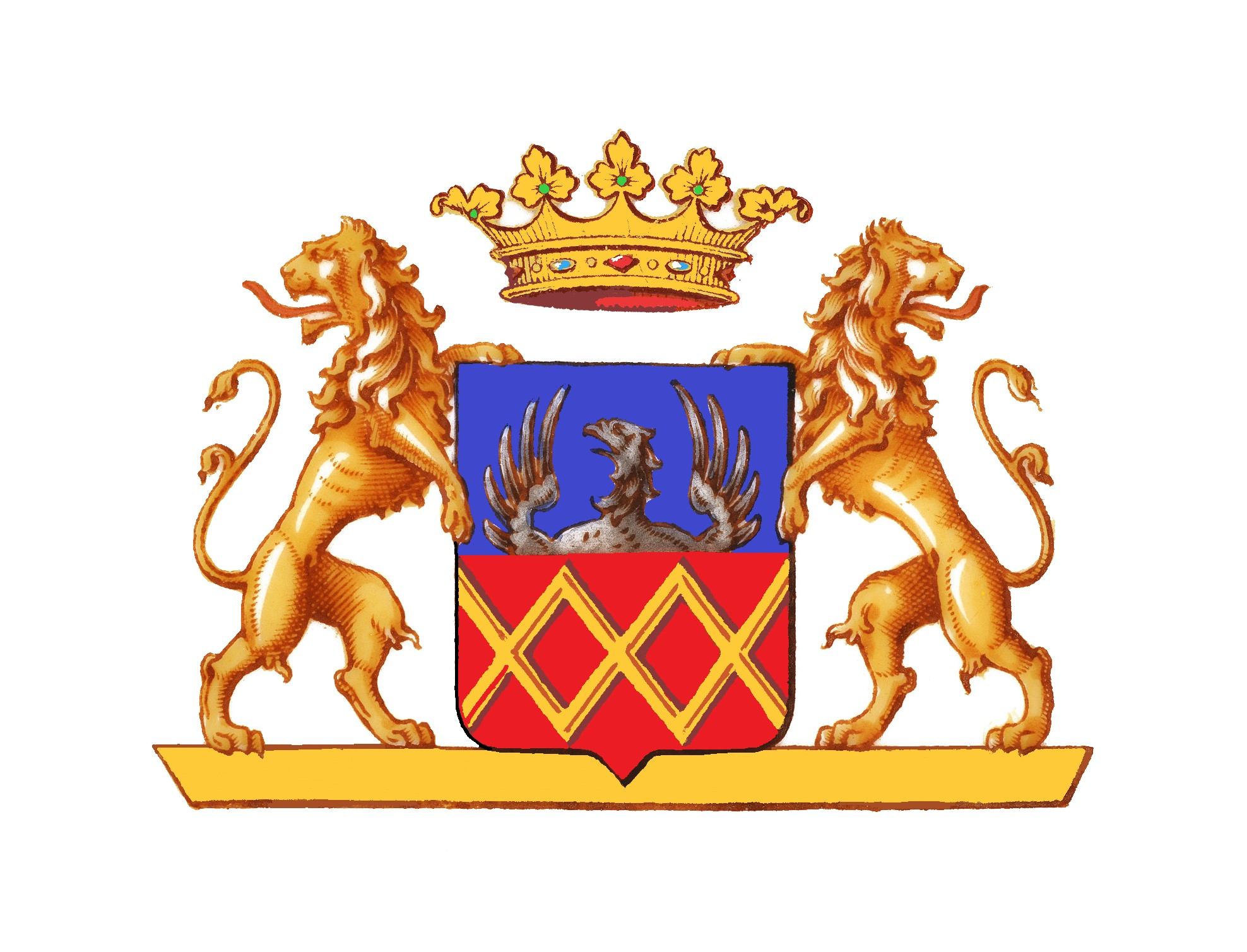 Provenance: Cyrille et Vera Narychkine, situé dans la chambre destinée au petit-déjeuner, Villa Narychkine à Biarritz